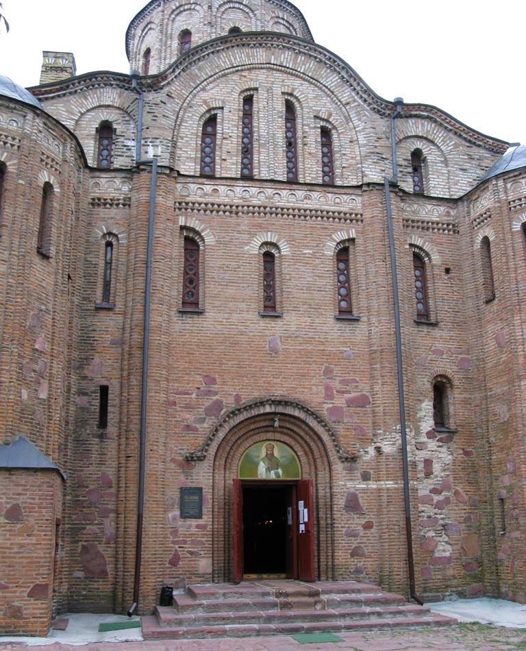 Головний_фасад_Василівського_храму_Овруча.jpg: Головний фасад Свято-Василівського собору в Овручі, серпень 2008